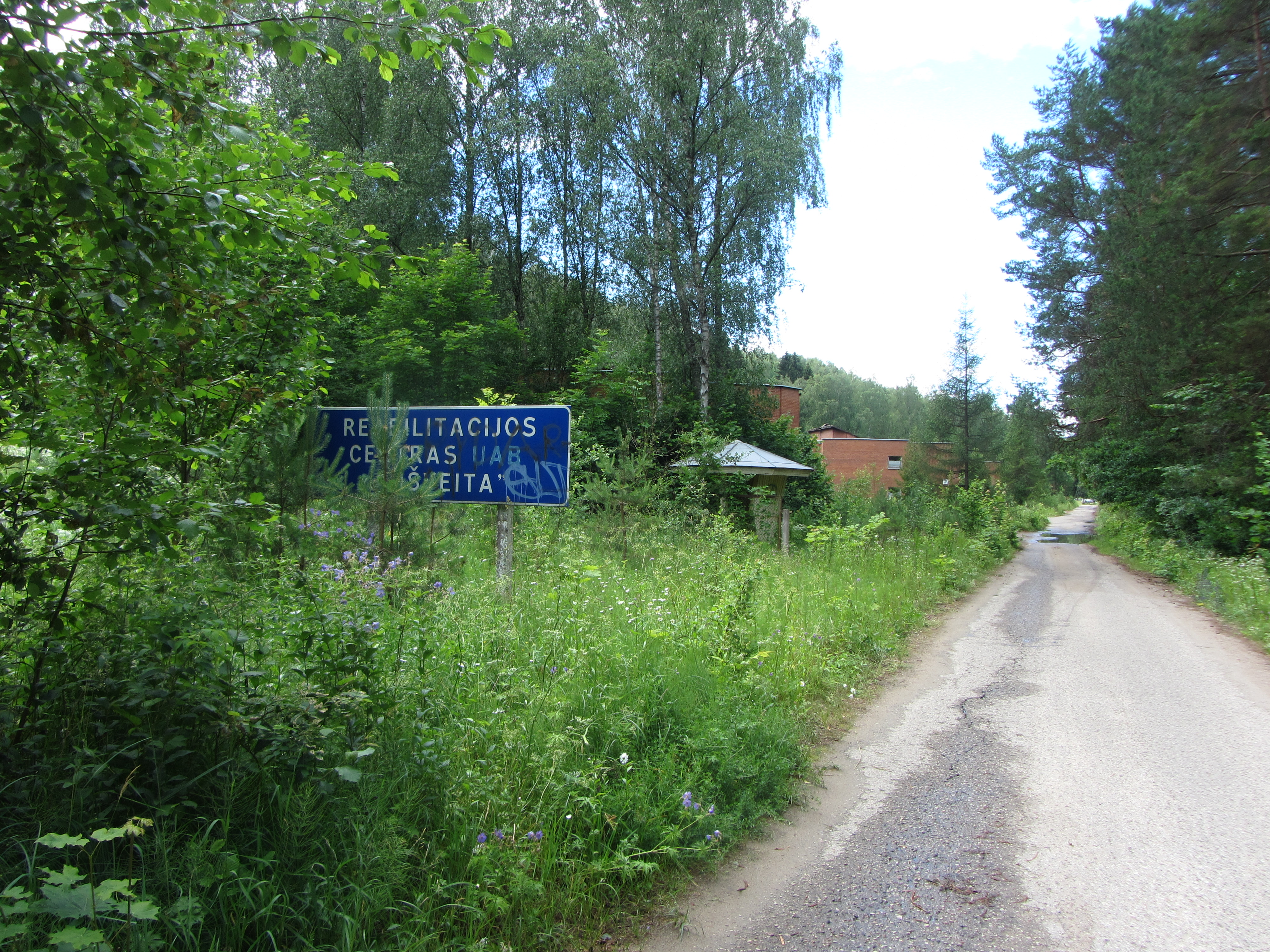 Vosyliukai 21401, Lithuania